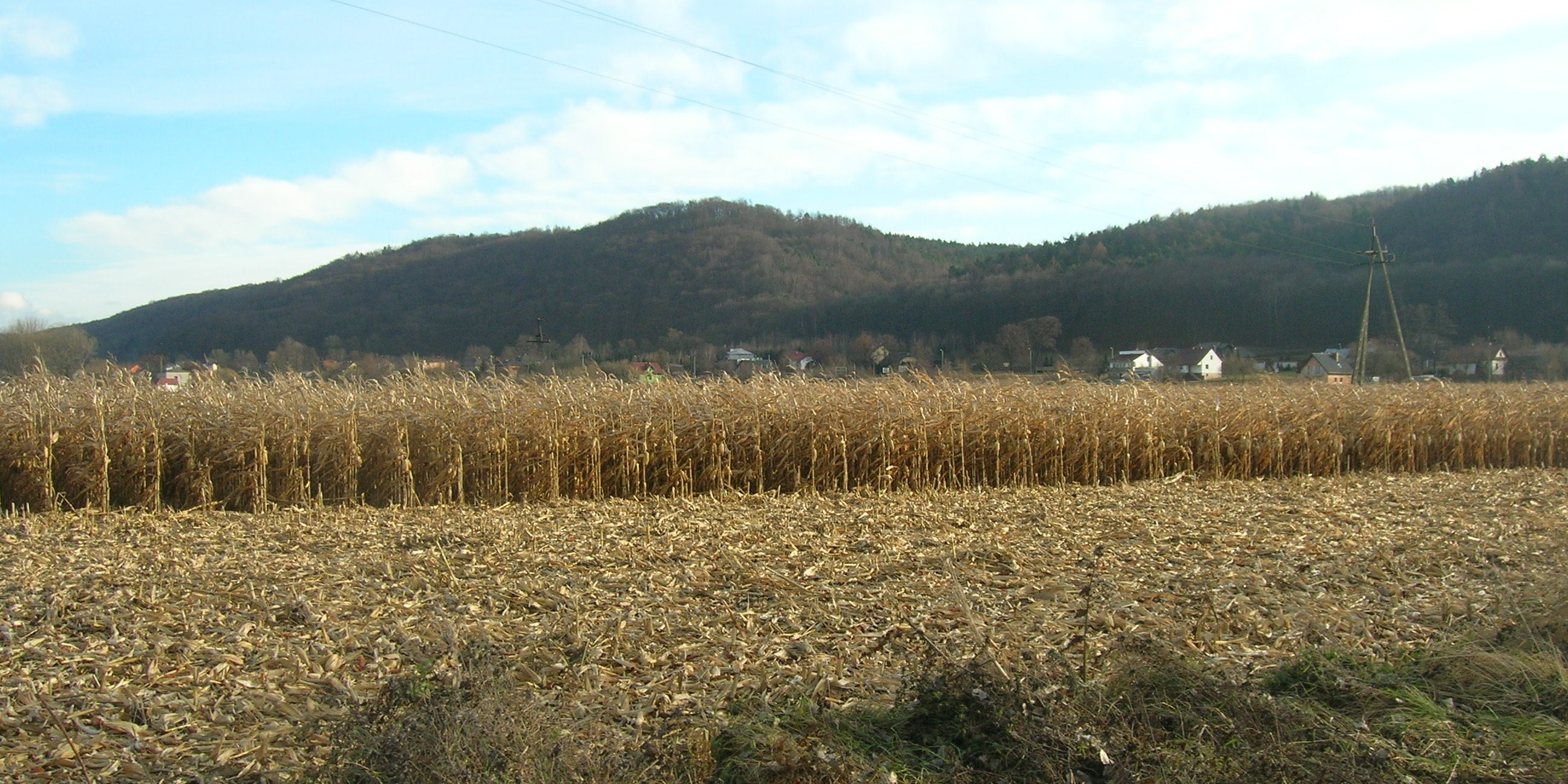 Kochanów. Widok z płd-zach.